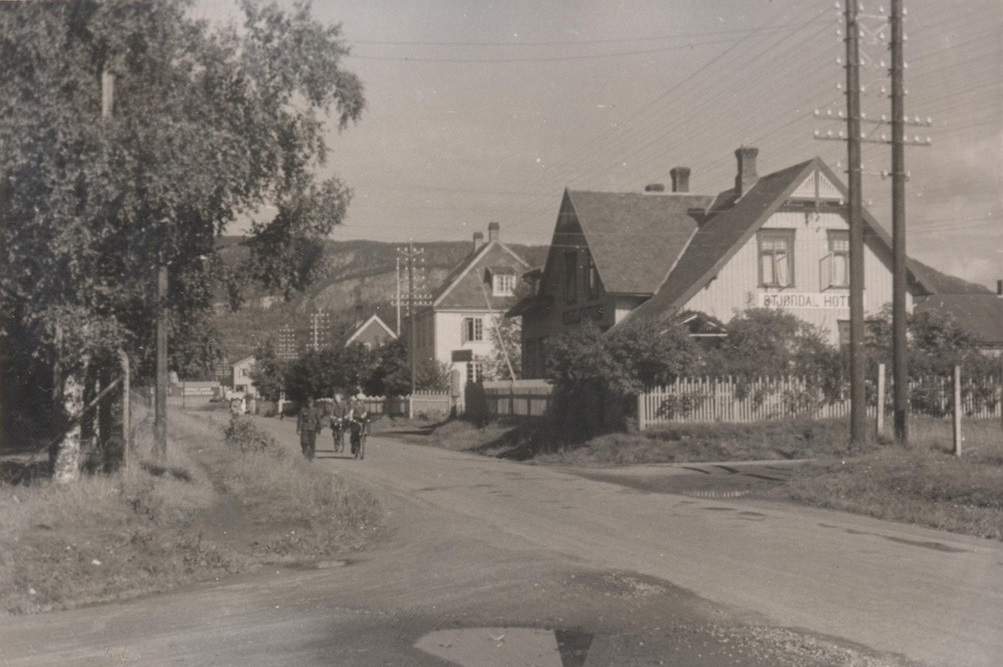 Parti av Innherredsveien i Stjørdal, Stjørdal Hotel på høyre side.